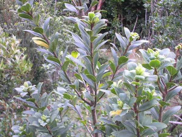 Ramas de pello-pello (Ovidia pillopillo) en Quiutil, Chonchi, Chile